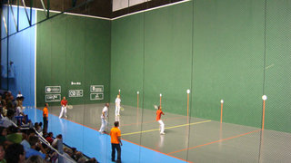 Es un partido de frontenis, en la liguilla de grupos en la IV Copa del Mundo Fronton 30 metros celebrada con Tenerife, en el RCN.